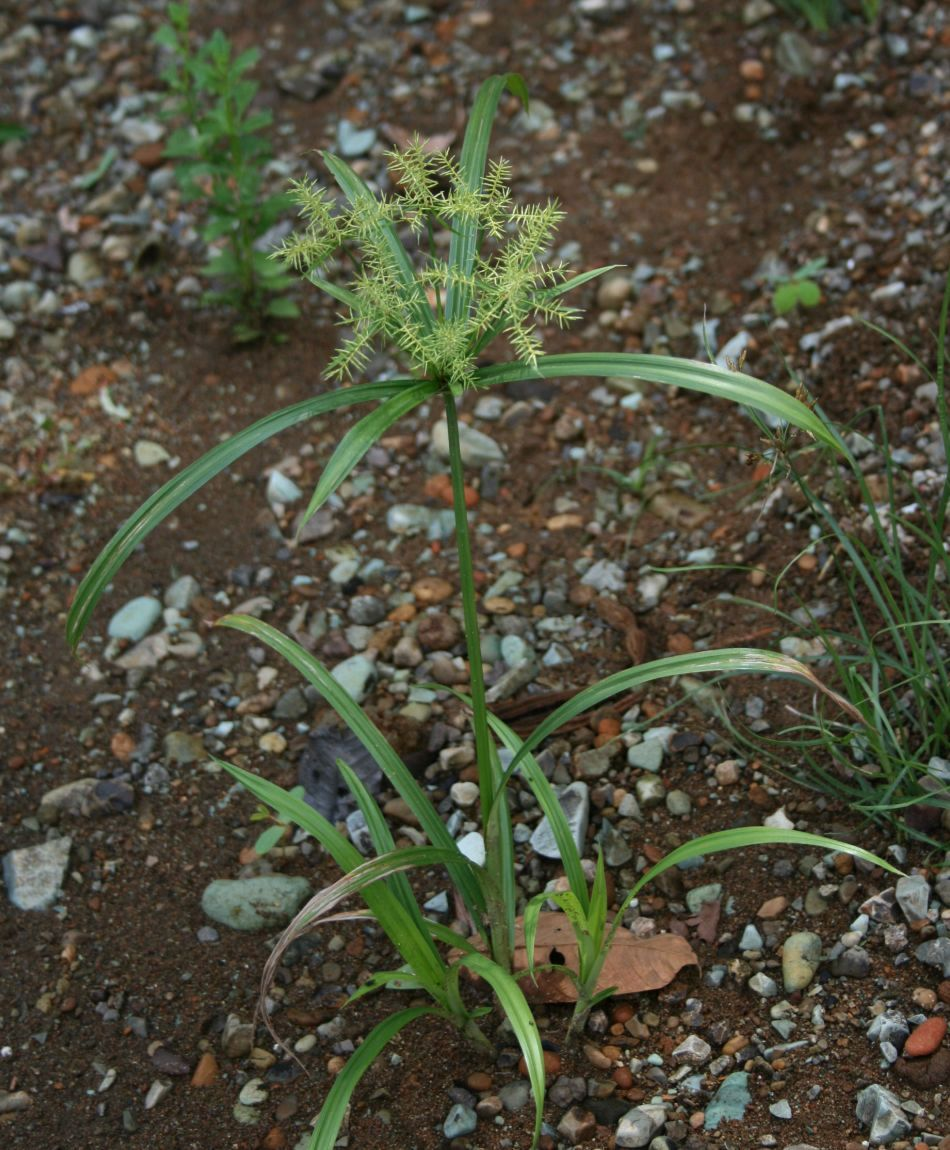 Cyperus odoratus, Sauergräser (Cyperaceae) - Costa Rica: Prov. Puntarenas, La Gamba NW Golfito, Valle Bonito